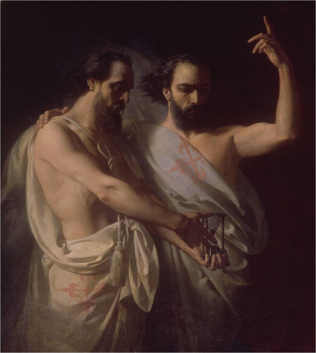 Detalle del cuadro titulado los Últimos momentos de Fernando IV el Emplazado. La imagen representa los espíritus o fantasmas de los hermanos Carvajales, que fueron arrojados desde la cumbre de la Peña de Martos en 1312 por orden del rey Fernando IV de Castilla.